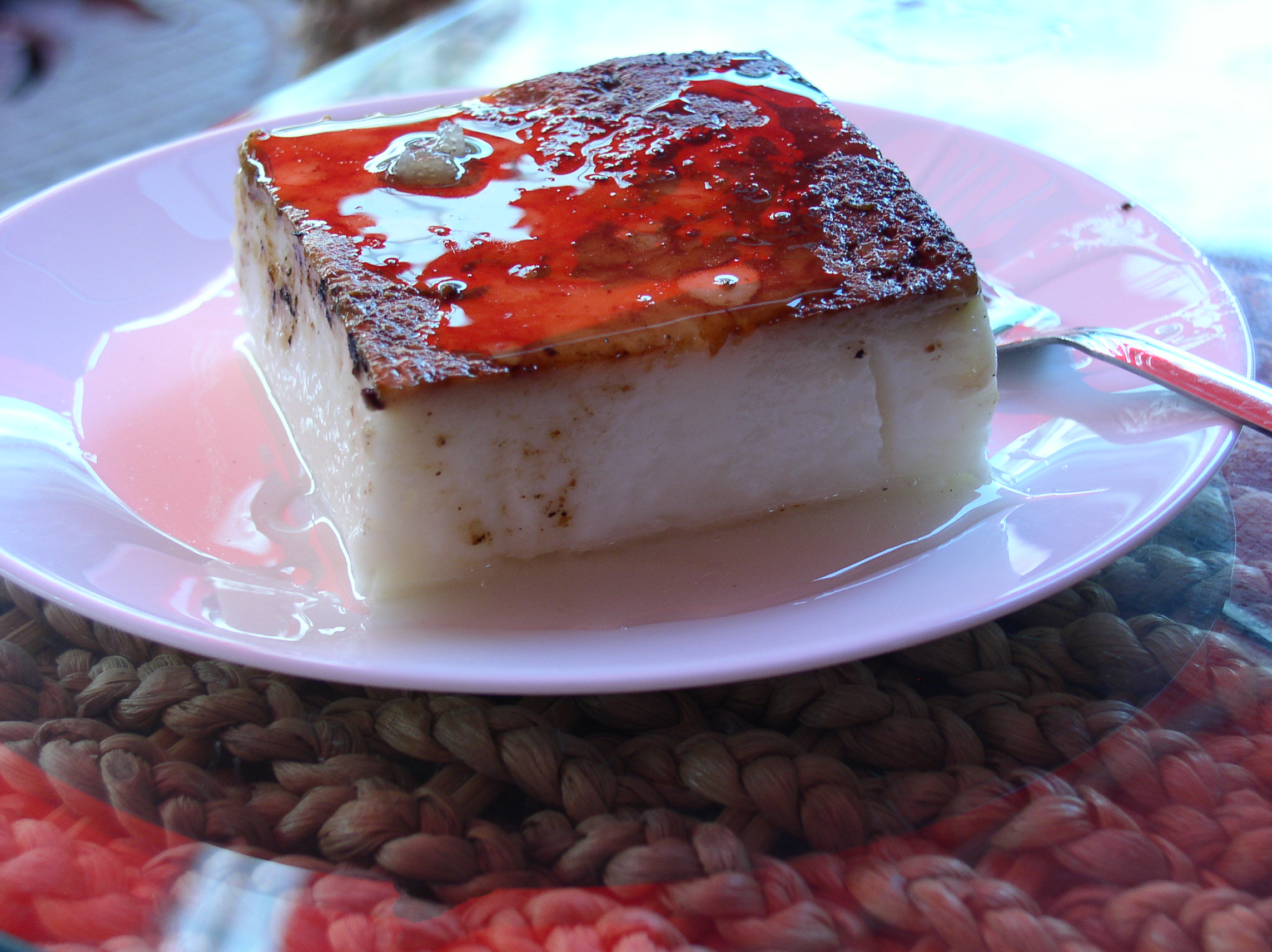 Kazandibi, turski kolač napravljen u poslastičarnici Ohrid u Skopskoj staroj čaršiji